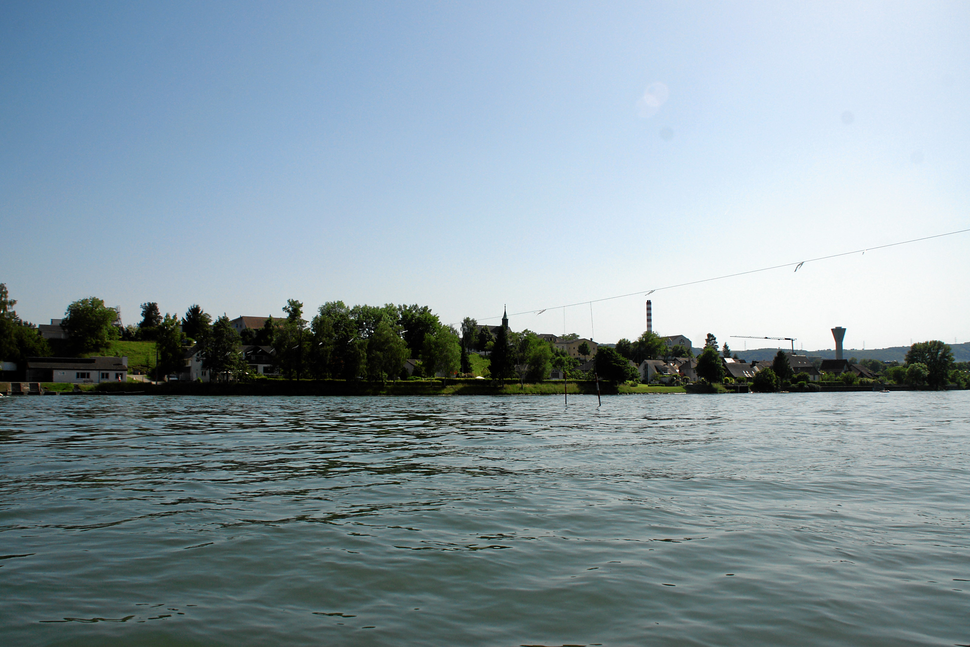 Hochrheinfahrt: Sisseln